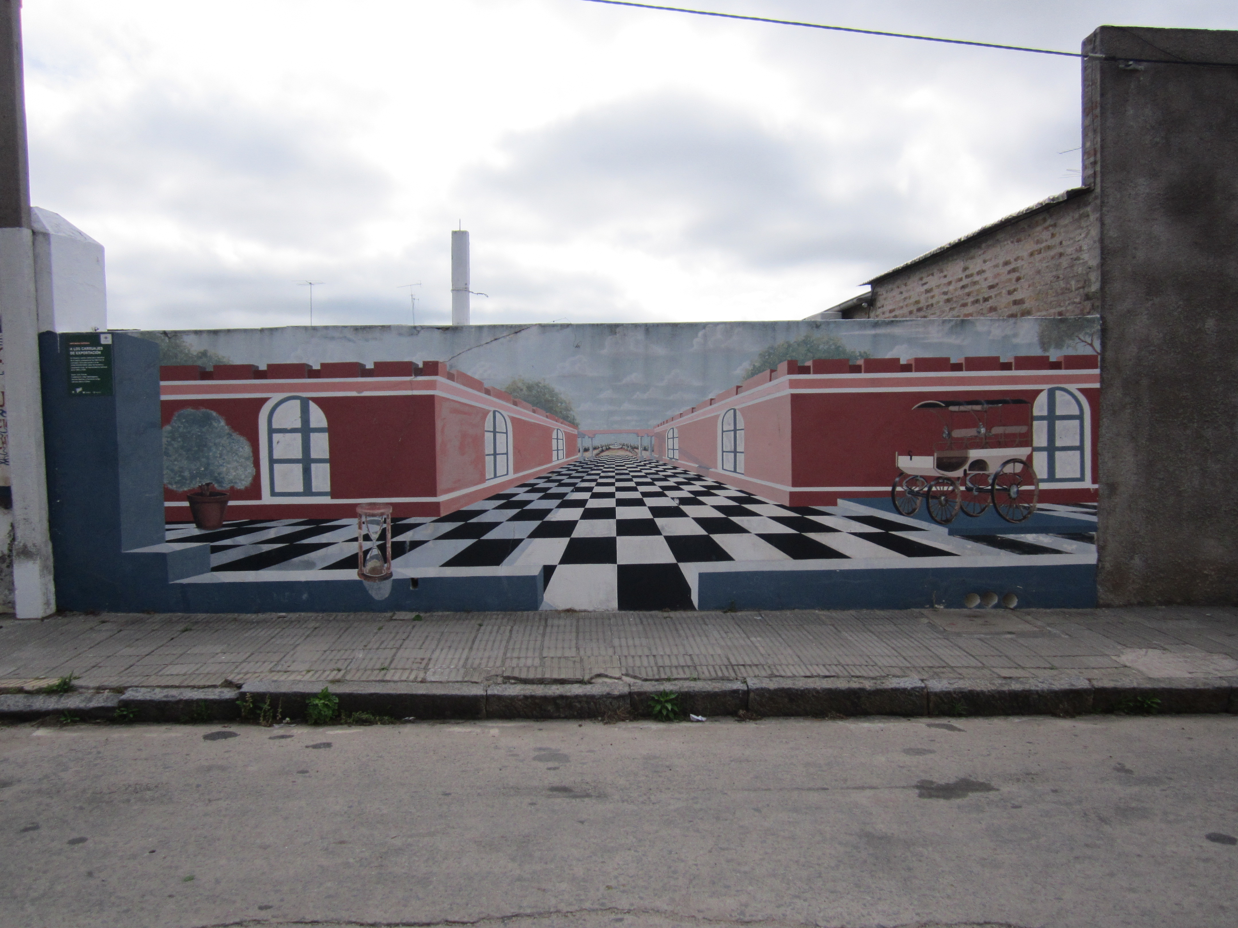 A los carruajes de exportación.